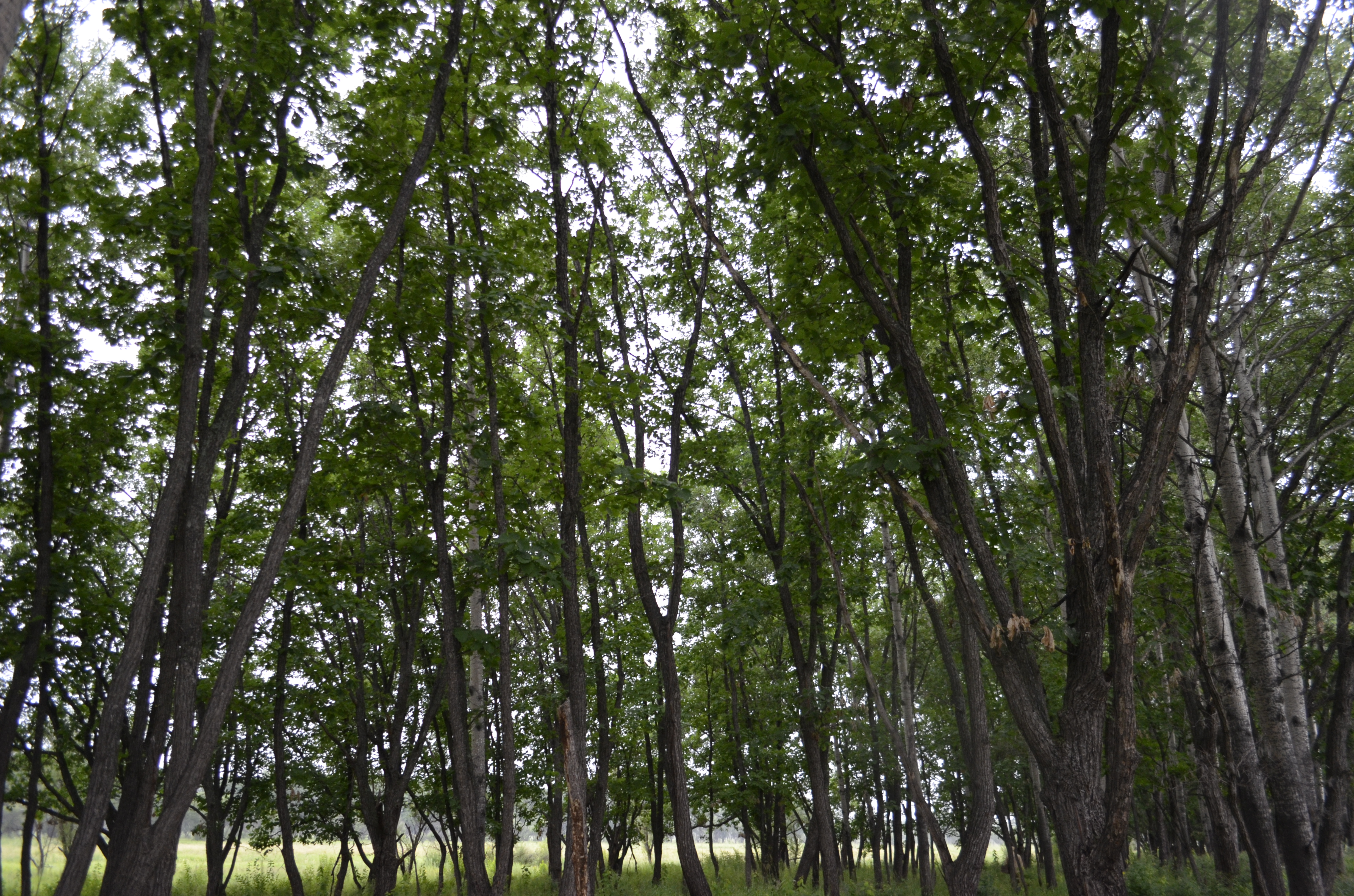 Dalnerechensky District, Primorsky Krai, Russia